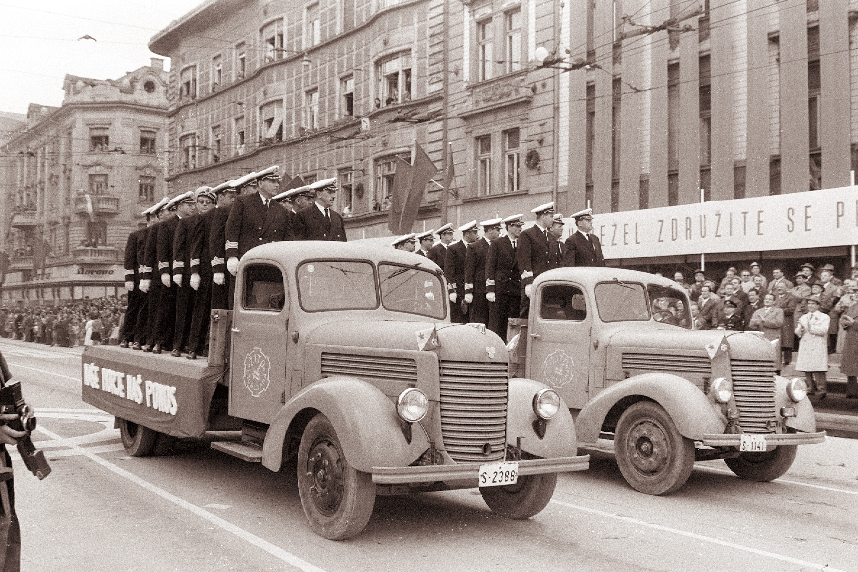 Prvomajski sprevod v Ljubljani